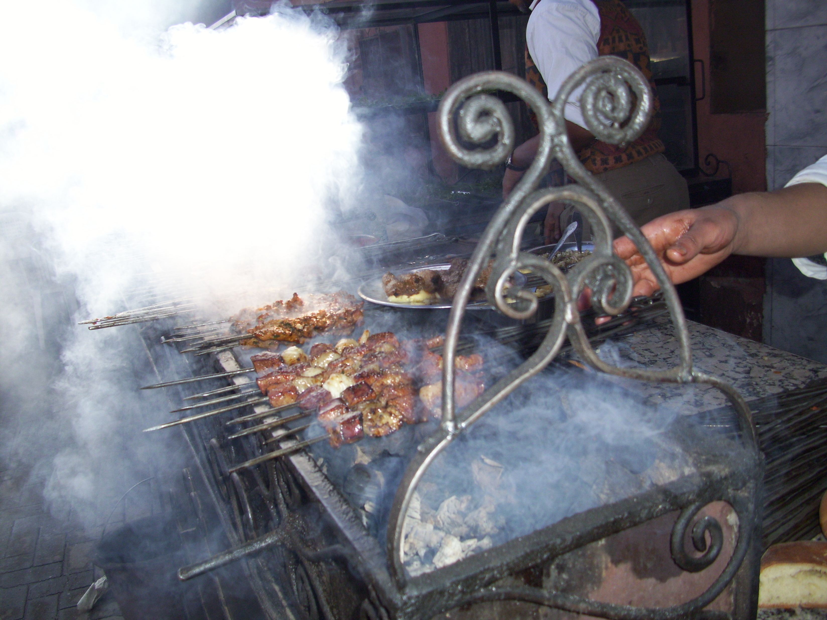 Dei tahricht cotti alla brace nella medina di Marrakech